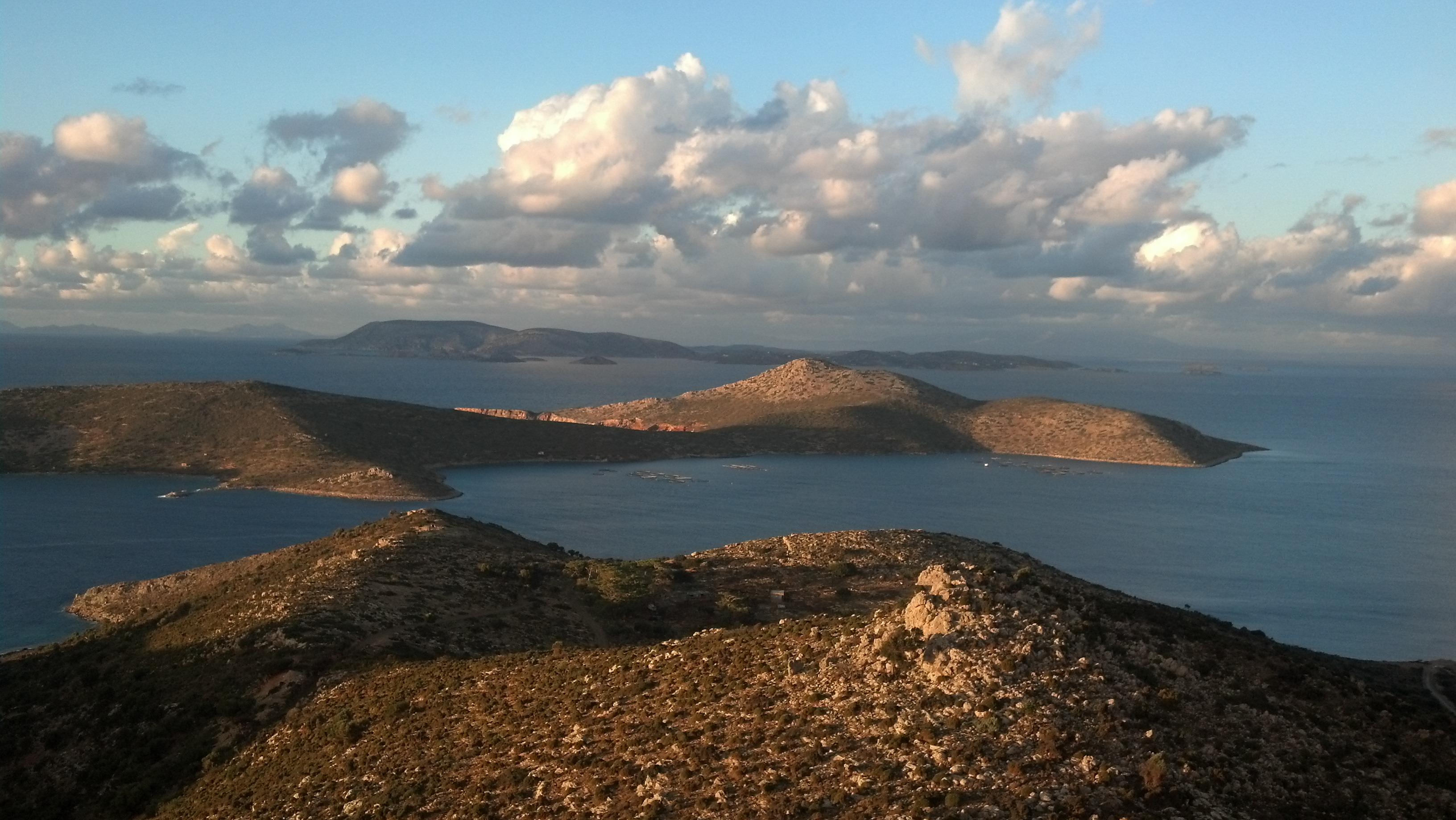 Ανατολικό τμήμα Αρχάγγελου Λέρου από τη κόρυφη Μάρκελος. Στο βάθος διακρίνονται οι Λειψοί.